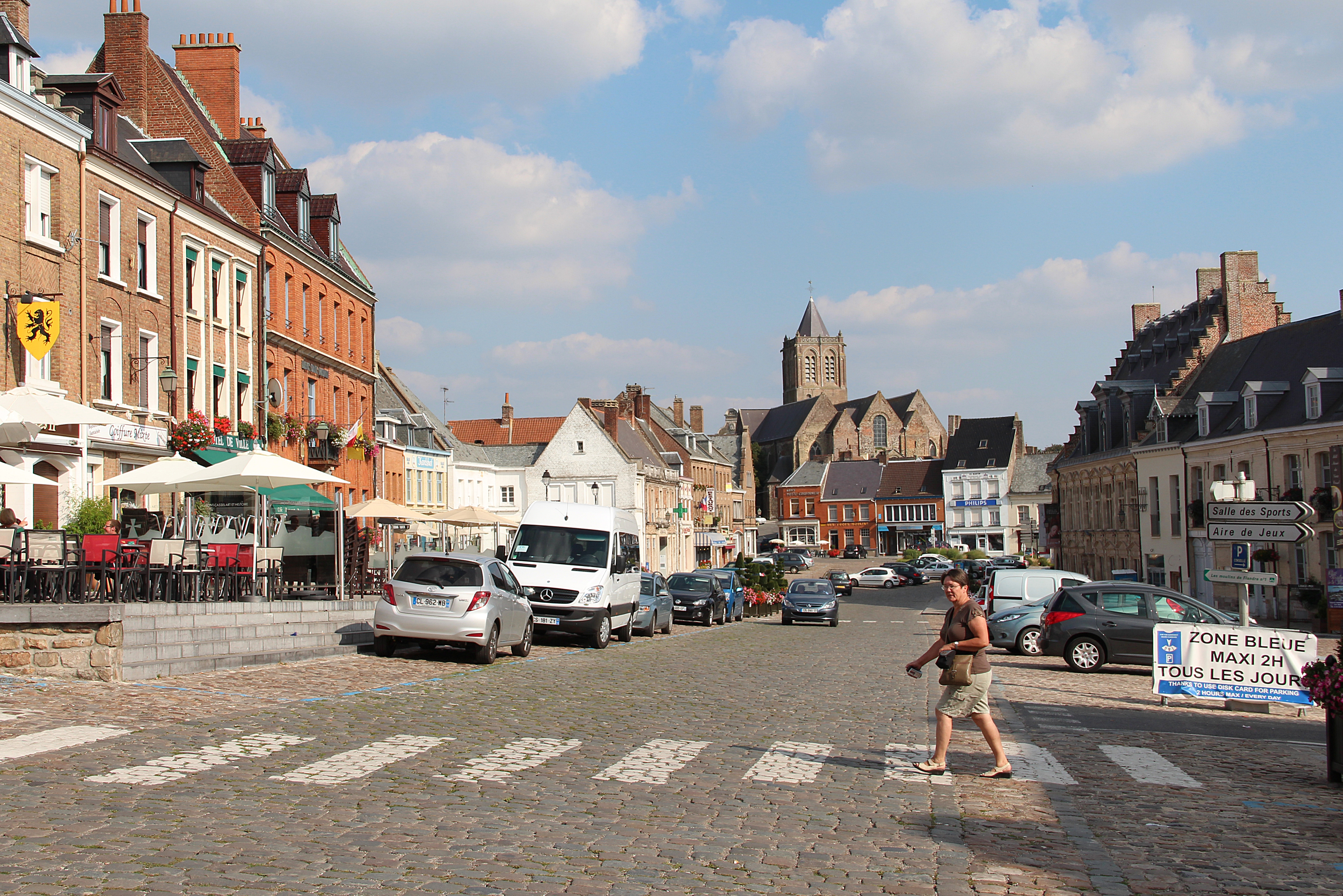 Cassel (département du Nord, France) : Grand'Place et collégiale Notre-Dame-de-la-Crypte.